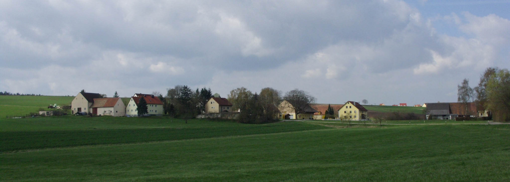 Obenbrunn, Gemeindeteil von Gunzenhausen im mittelfränkischen Landkreis Weißenburg-Gunzenhausen